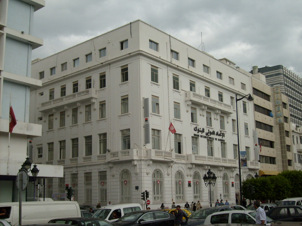 Siège de l'Union internationale de banques à Tunis (Tunisie)